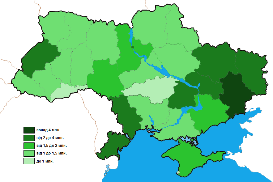 Мапа України із зазначенням кількості населення за регіонами (на 01.05.2012)